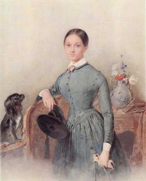 "Портрет графини Софьи Львовны Шуваловой, урож. Нарышкиной"